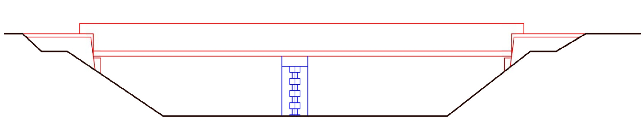 Skizze der Panzerbrücke über die Weiße Elster auf dem ehemaligen VOMAG-Gelände in Plauen.